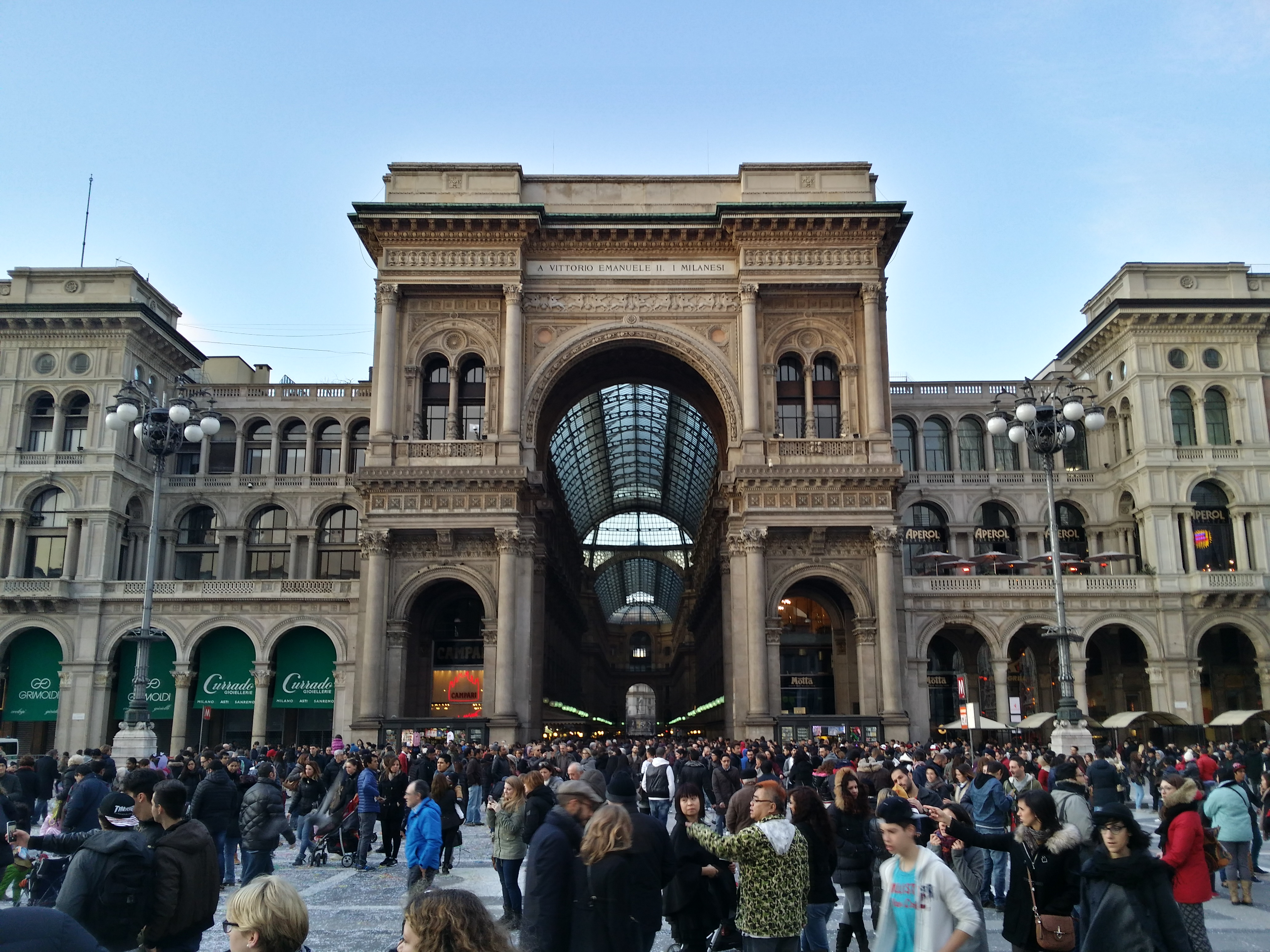 Galleria Vittorio Emanuele II, Milano. Marzo 2014